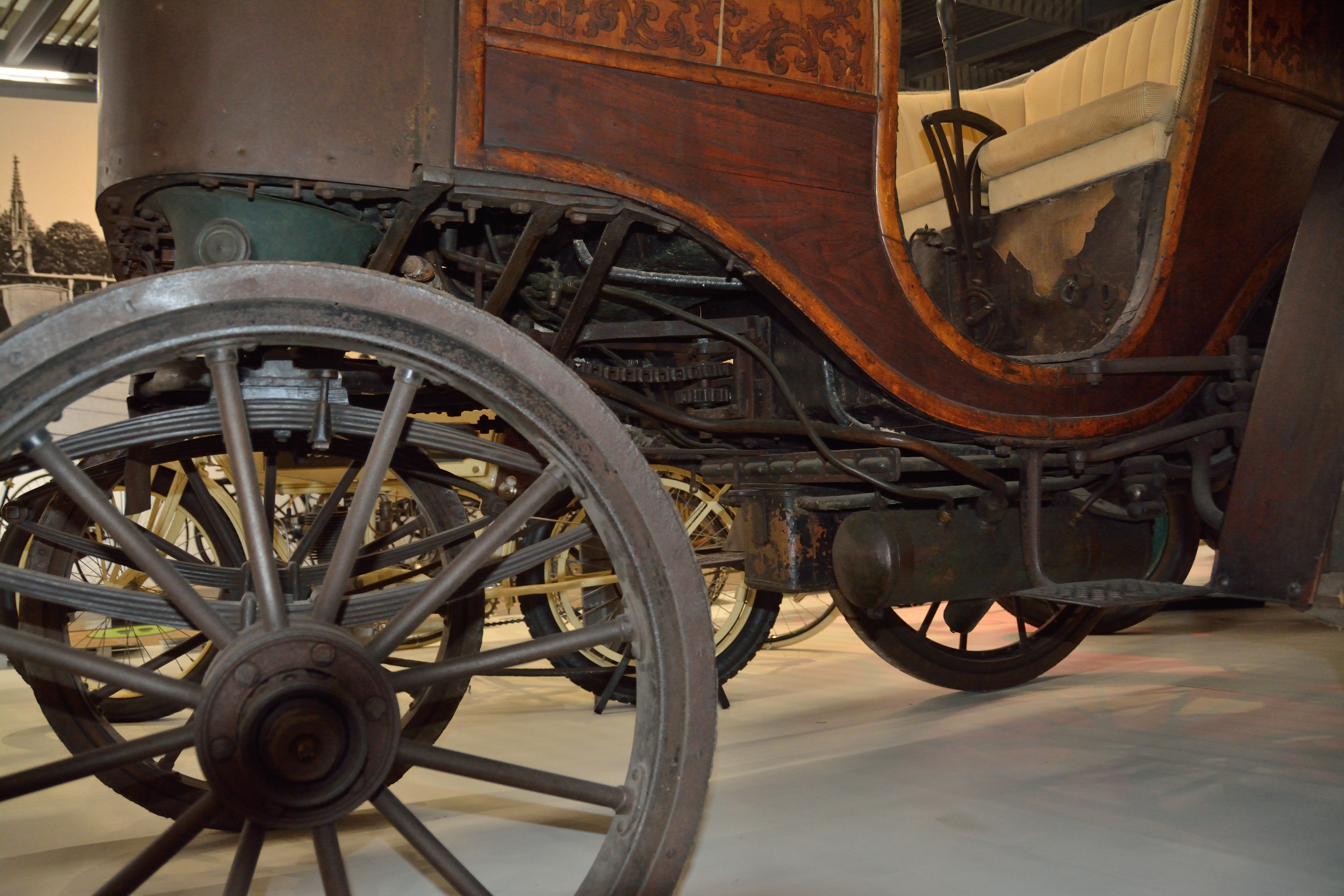 Das älteste erhaltene Automobil in Sachsen - ein Dampfwagen. Konstruiert von Gustav Adolf Schöche 1895. Deutsches Museum München, heute als Leihgabe im Verkehrsmuseum Dresden.